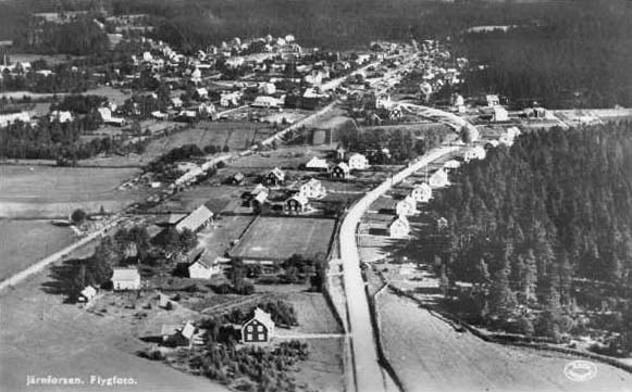 Flygfoto över Järnforsen